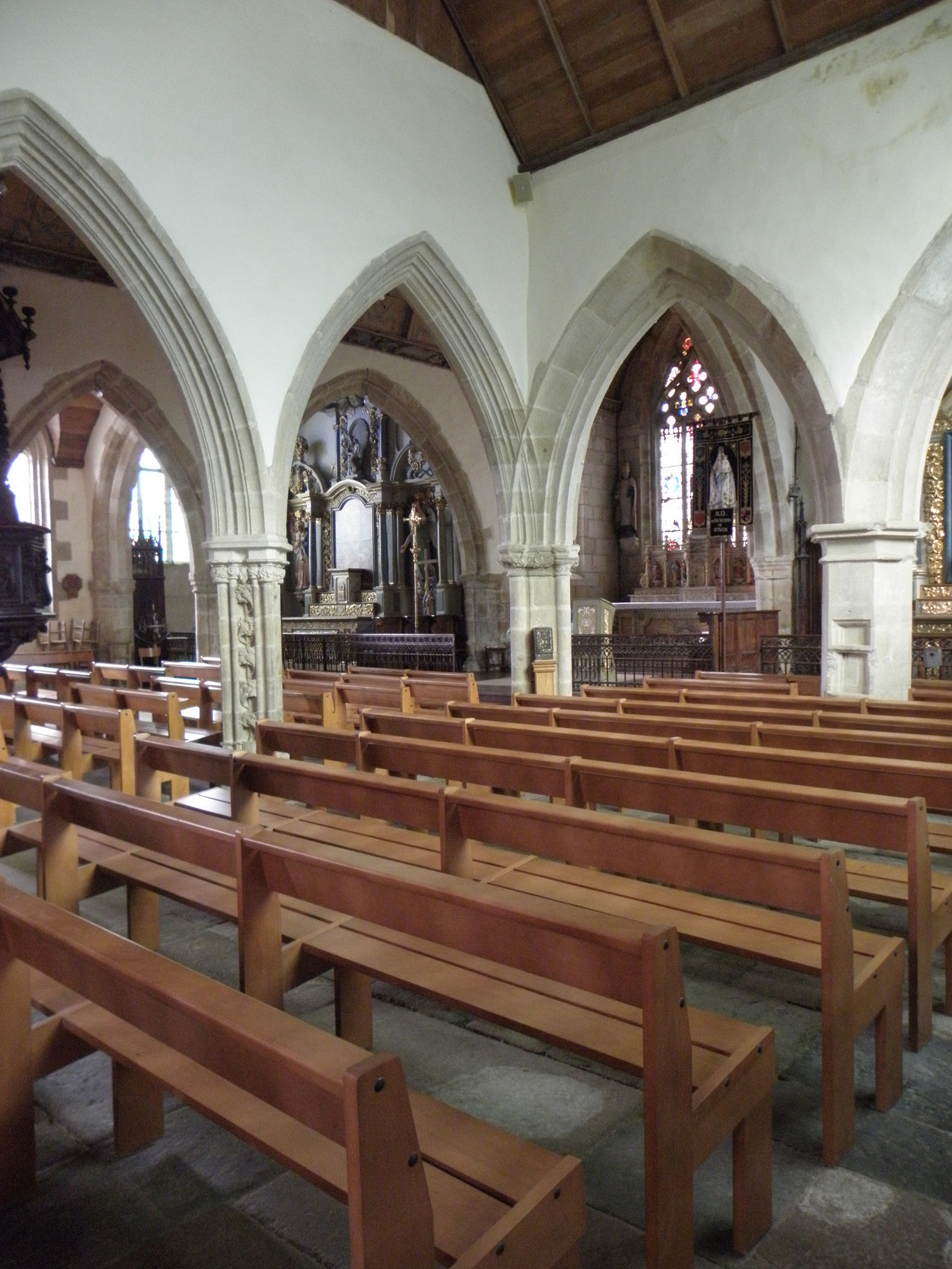 Chapelle sud de l'église Notre-Dame de Runan (22). .